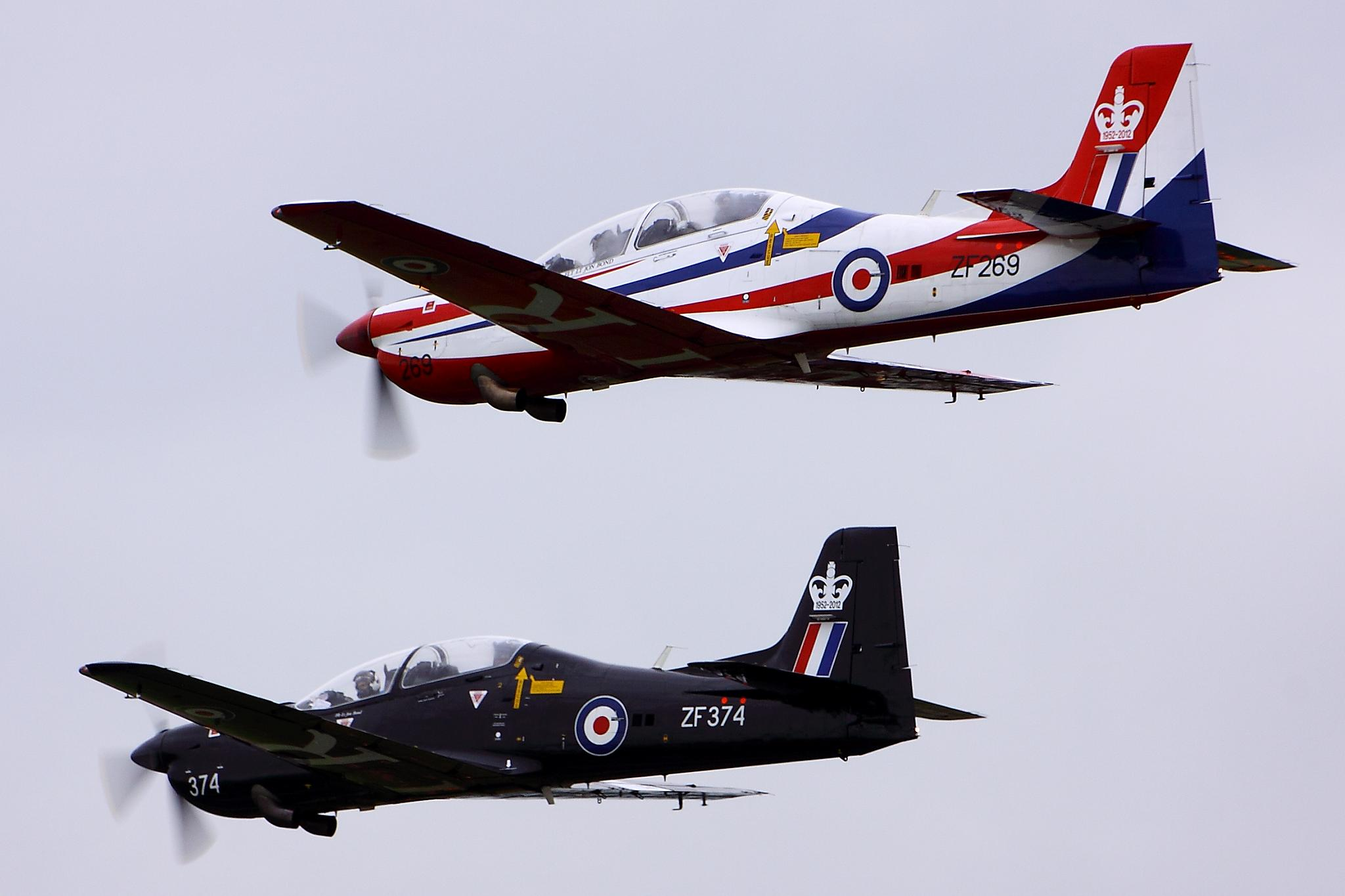 Tucanos - RIAT 2012